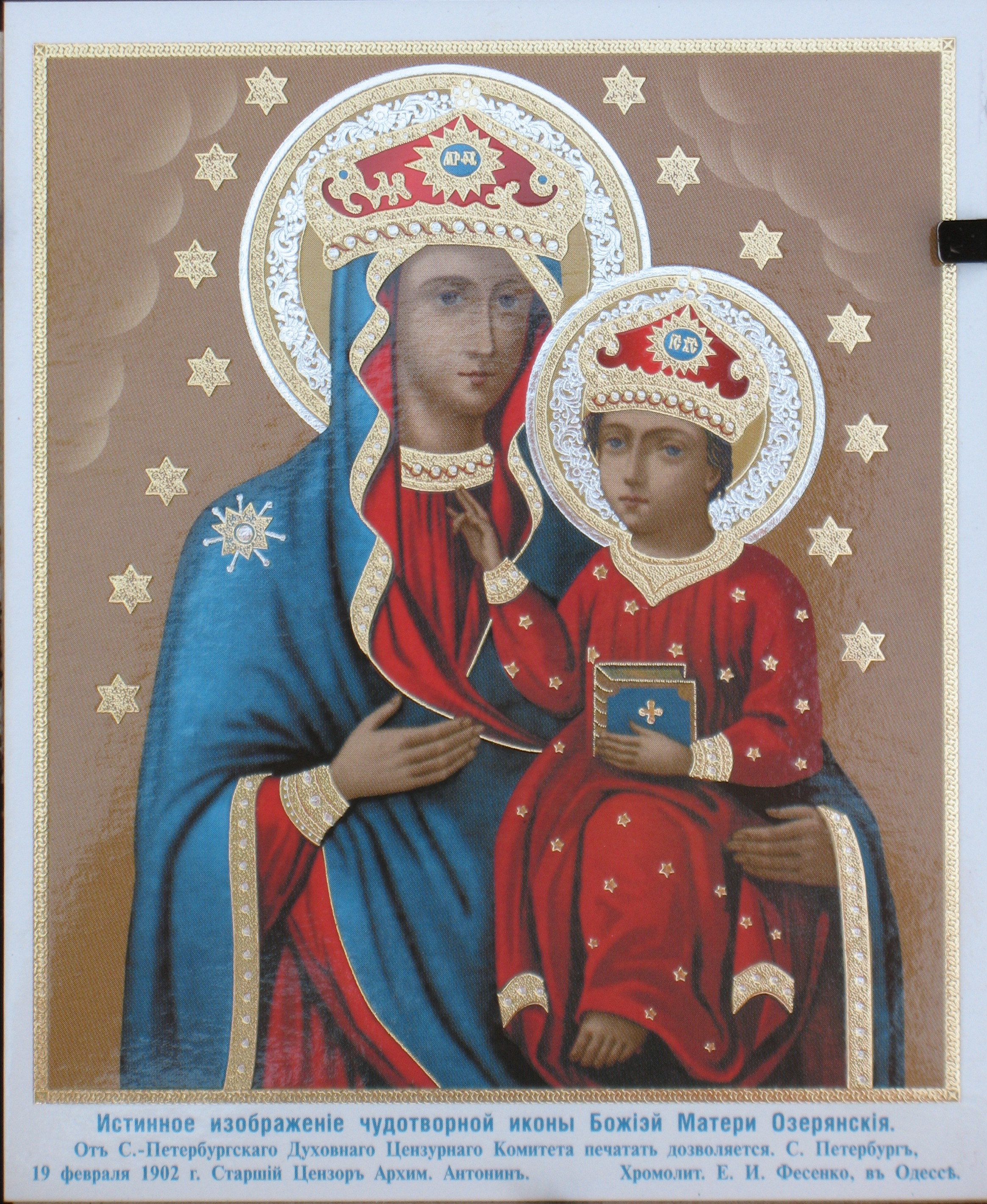 "Истинное изображение чудотворной иконы Божией Матери Озерянския". От СПб Духовнаго Цензурнаго Комитета печатать дозволяется. Старший Цензор Архимандрит Антонин (Грановский).